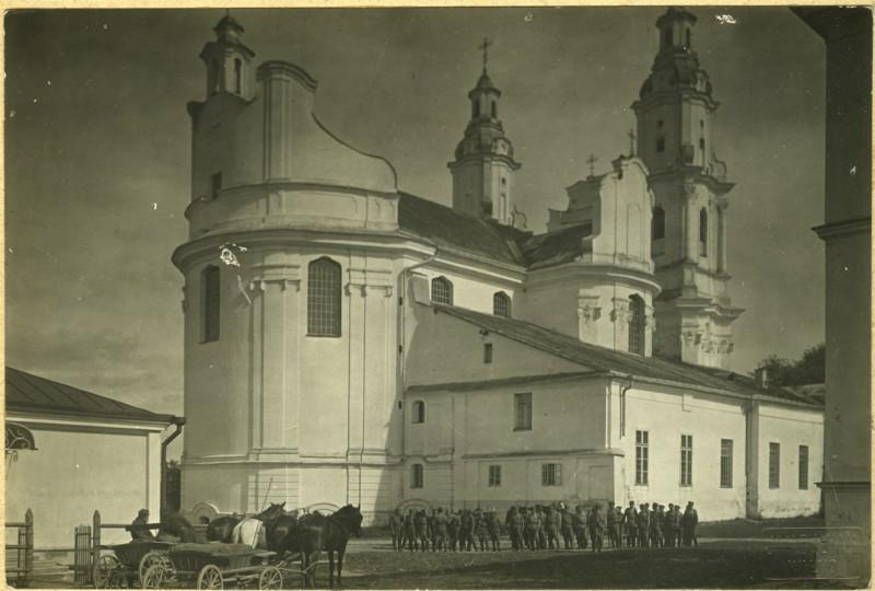 Беларуская (тарашкевіца): Глыбокае (Hłybokaje), Беразьвечча (Bieraźviečča). Царква Сьвятых Апосталаў Пятра і Паўла і манастыр базылянаў